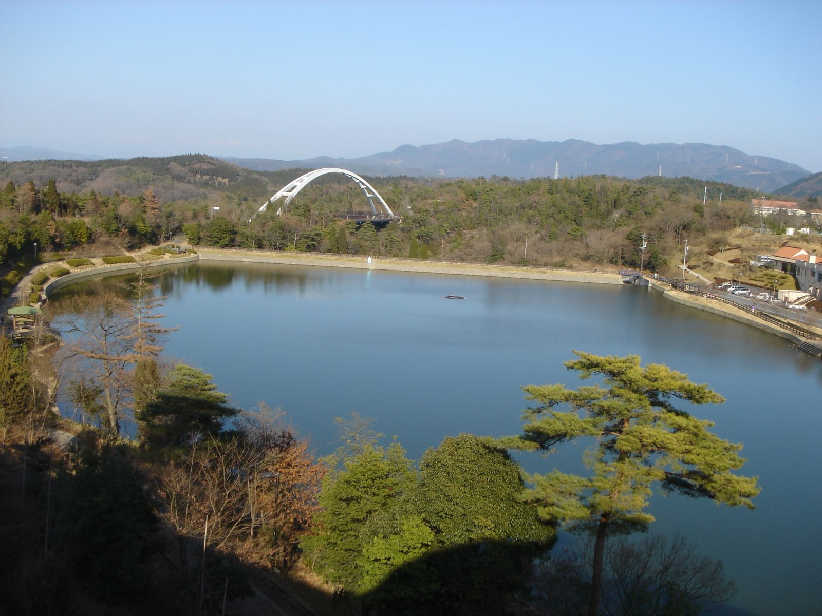 View from Toki Minoyaki Kaido(Roadside station)(道の駅土岐美濃焼街道より眺めた杉焼池と稚児岩大橋),Toki,Gifu,Japan(岐阜県土岐市肥田町肥田)で撮影